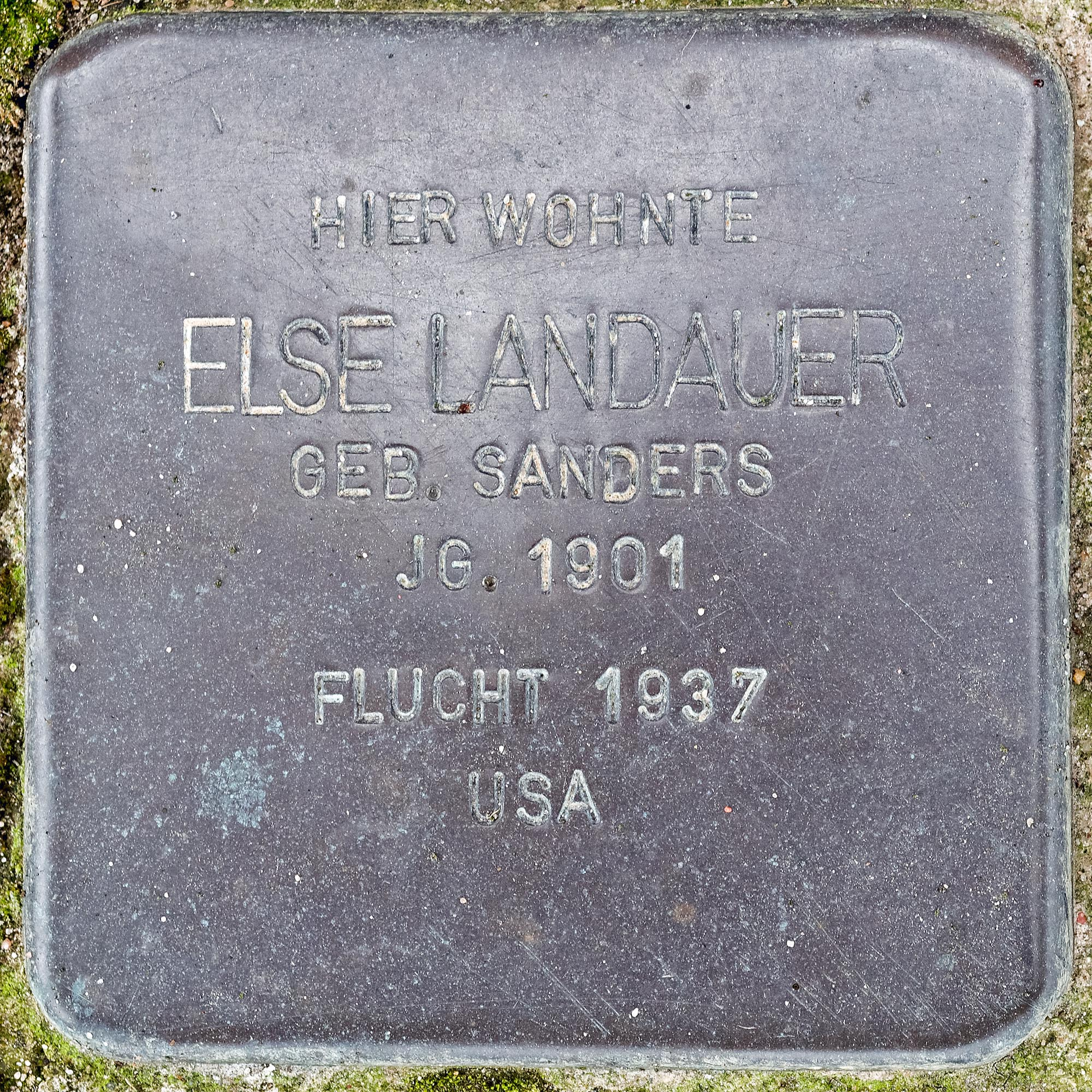 Stolperstein Landauer, Else